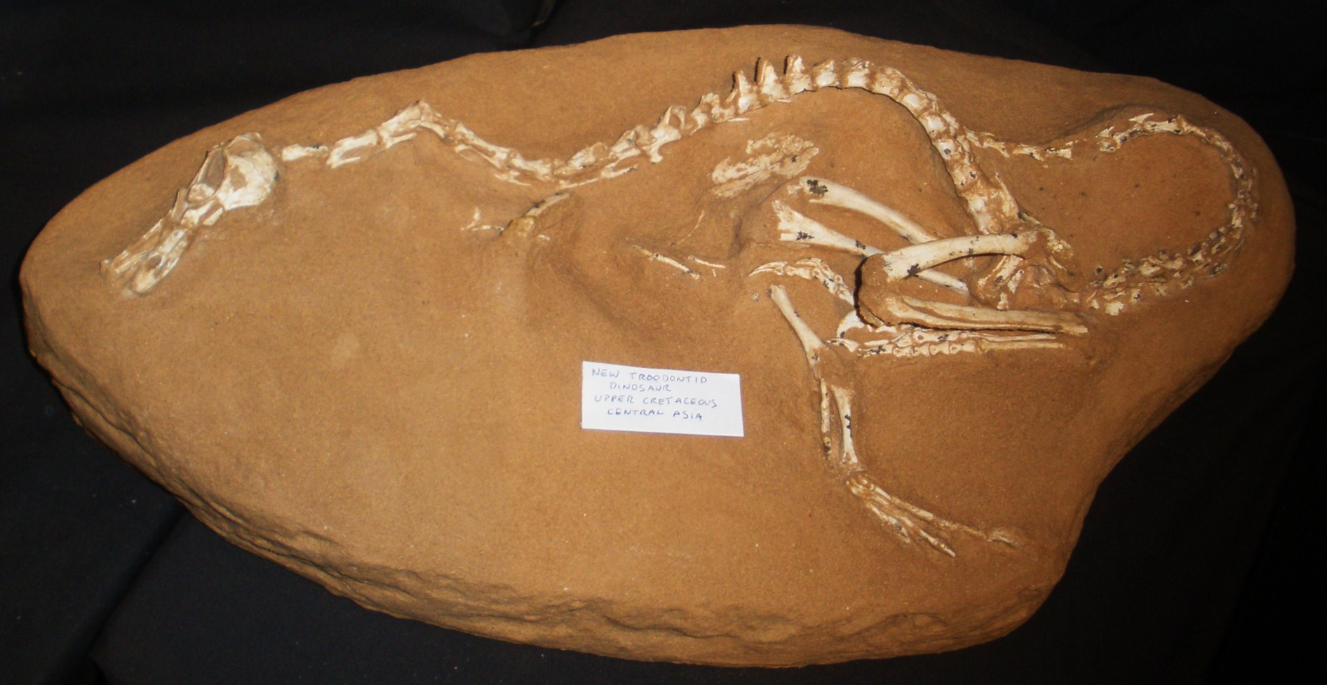 Fossil of a Halszkaraptor, originally thought to be an example of a troodontid. Took the photo at Fossil Show, Munich 2011